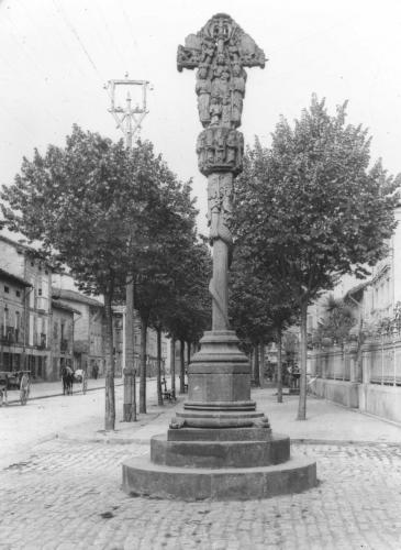 Cruz de Kurutzeaga de la localidad de Durango, en Vizcaya, País Vasco España. Antiquísima cruz de Cruciaga.